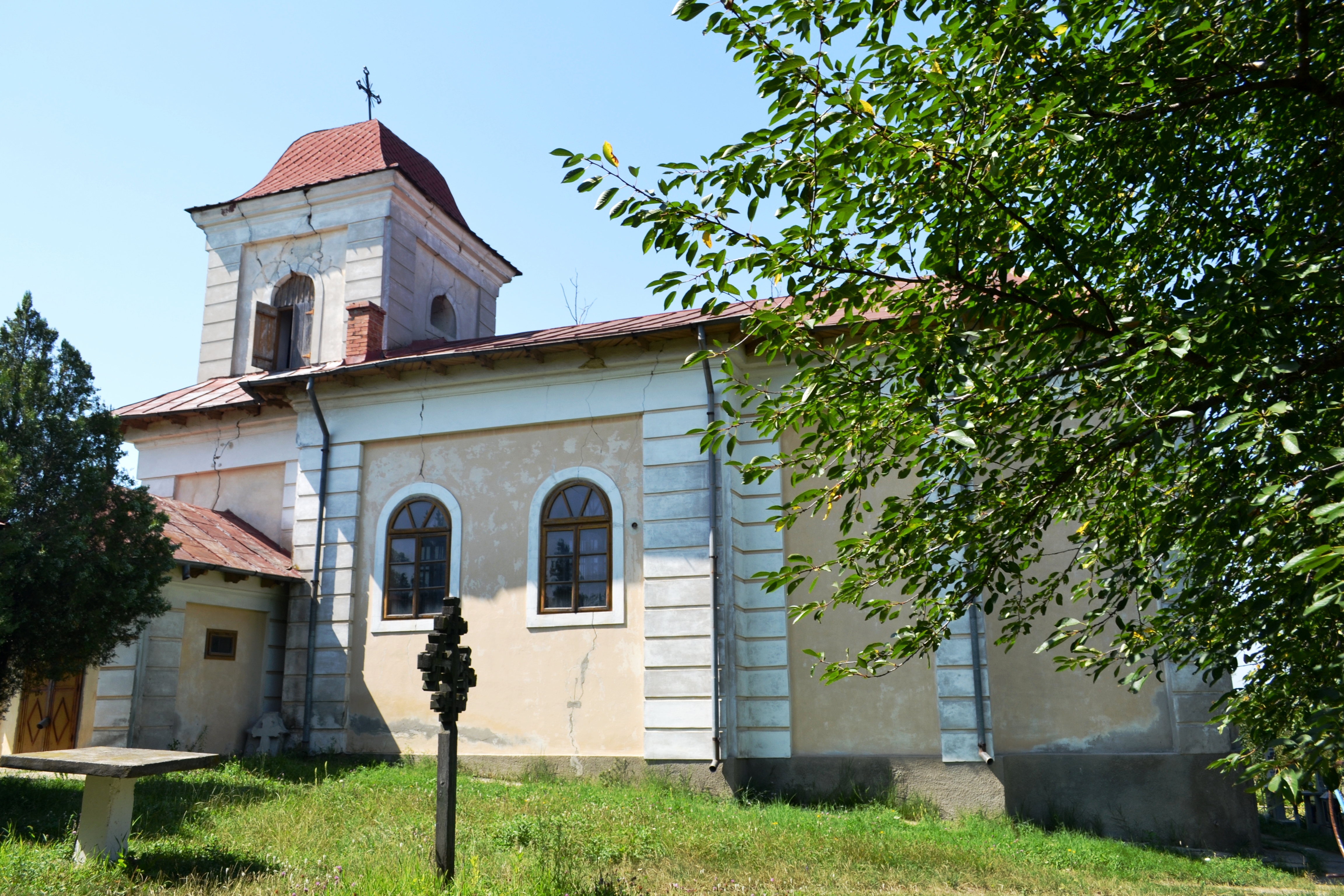 Biserica „Sf. Treime” din satul Buznea, comuna Ion Neculce, judetul Iasi